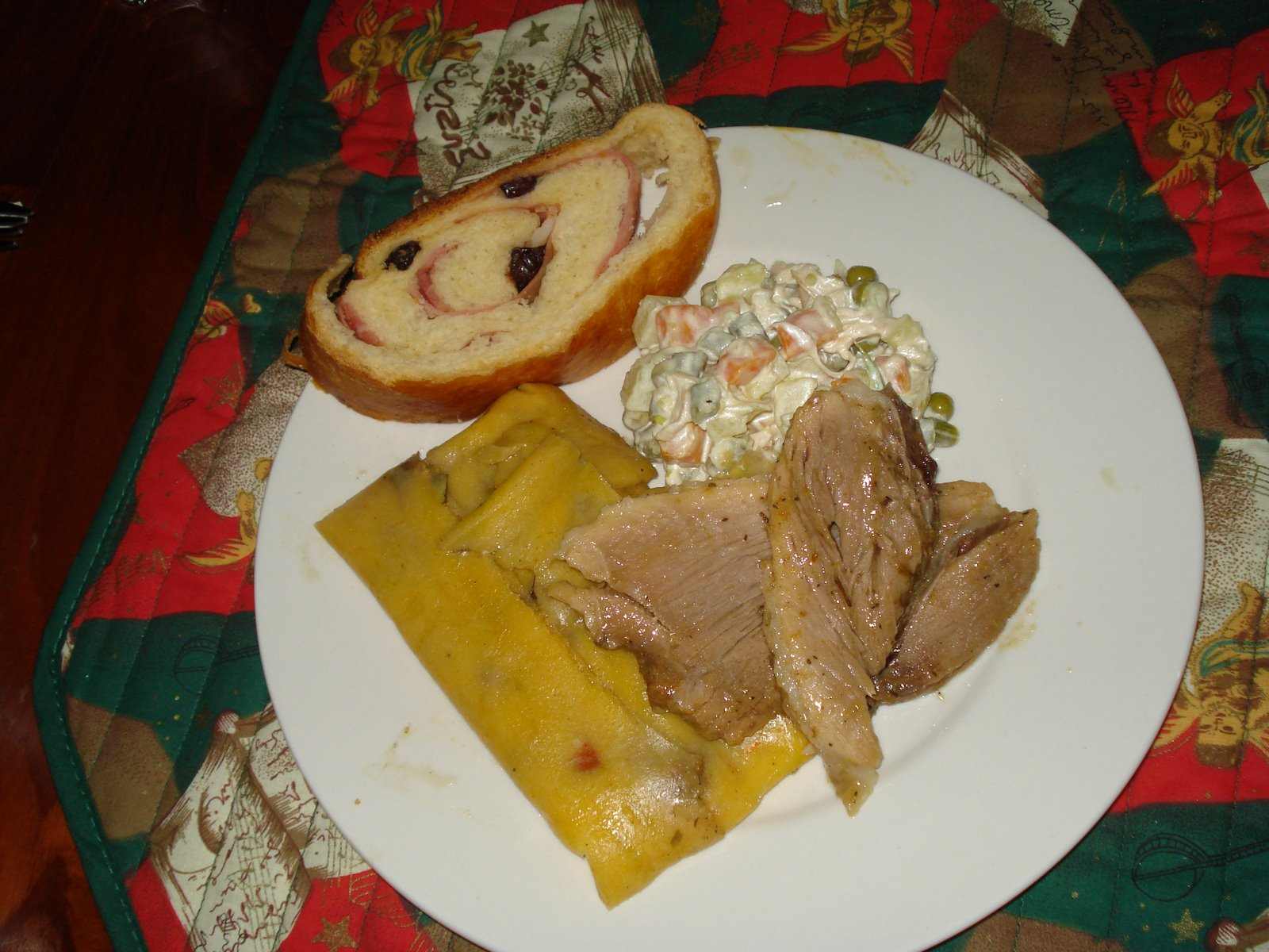 Cena típica navideña venezolana: Hallaca, pernil, ensalada de gallina y pan de jamón.